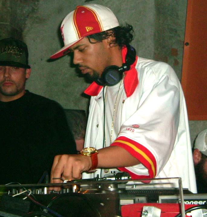 Samy Deluxe im "Gotischen Keller" in Tirol, Innsbruck (Österreich).